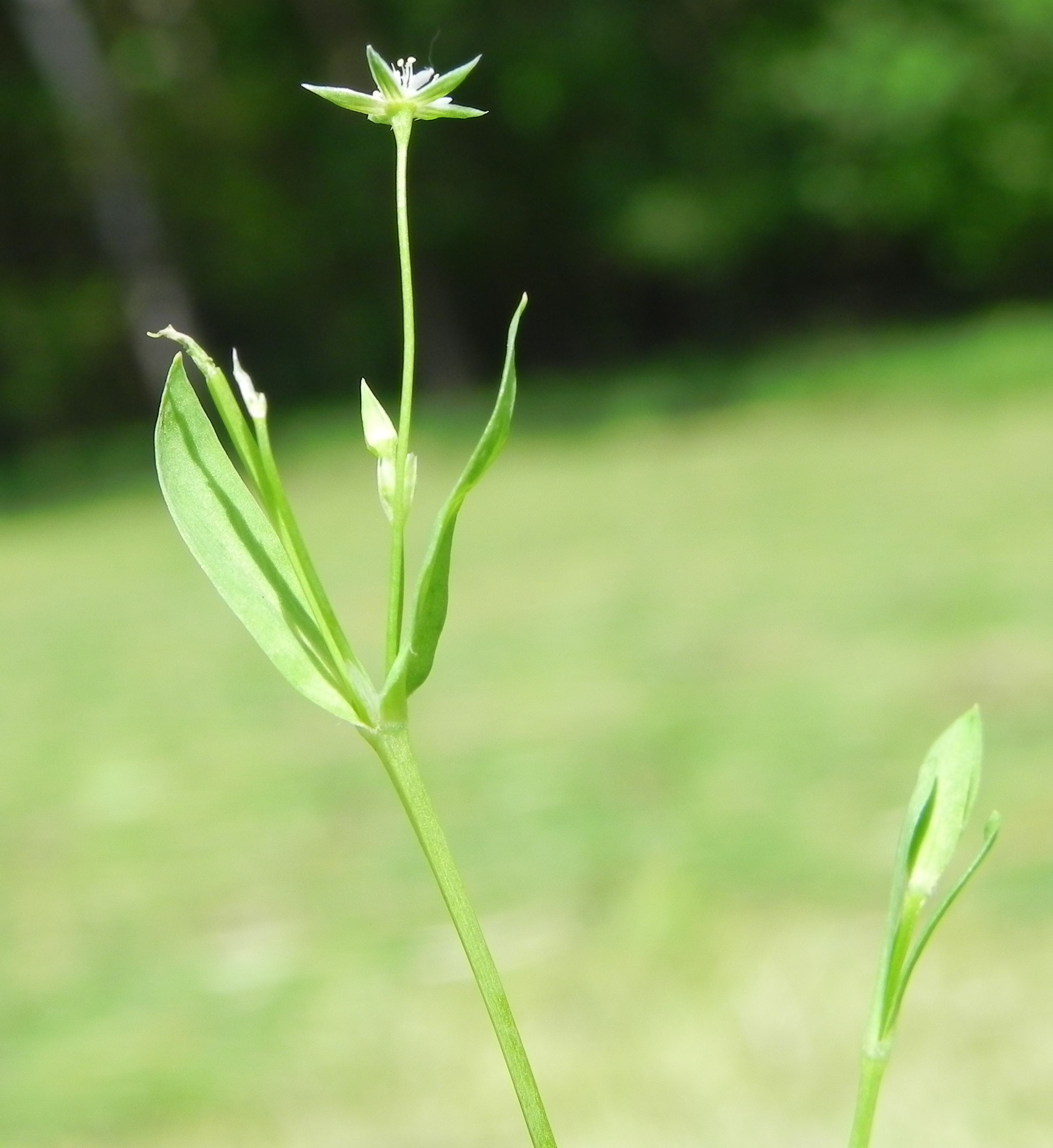 Bach-Sternmiere (Stellaria alsine), auch Quell-Sternmiere, an der Örtze, im Naturpark Südheide, Niedersachsen, Germany